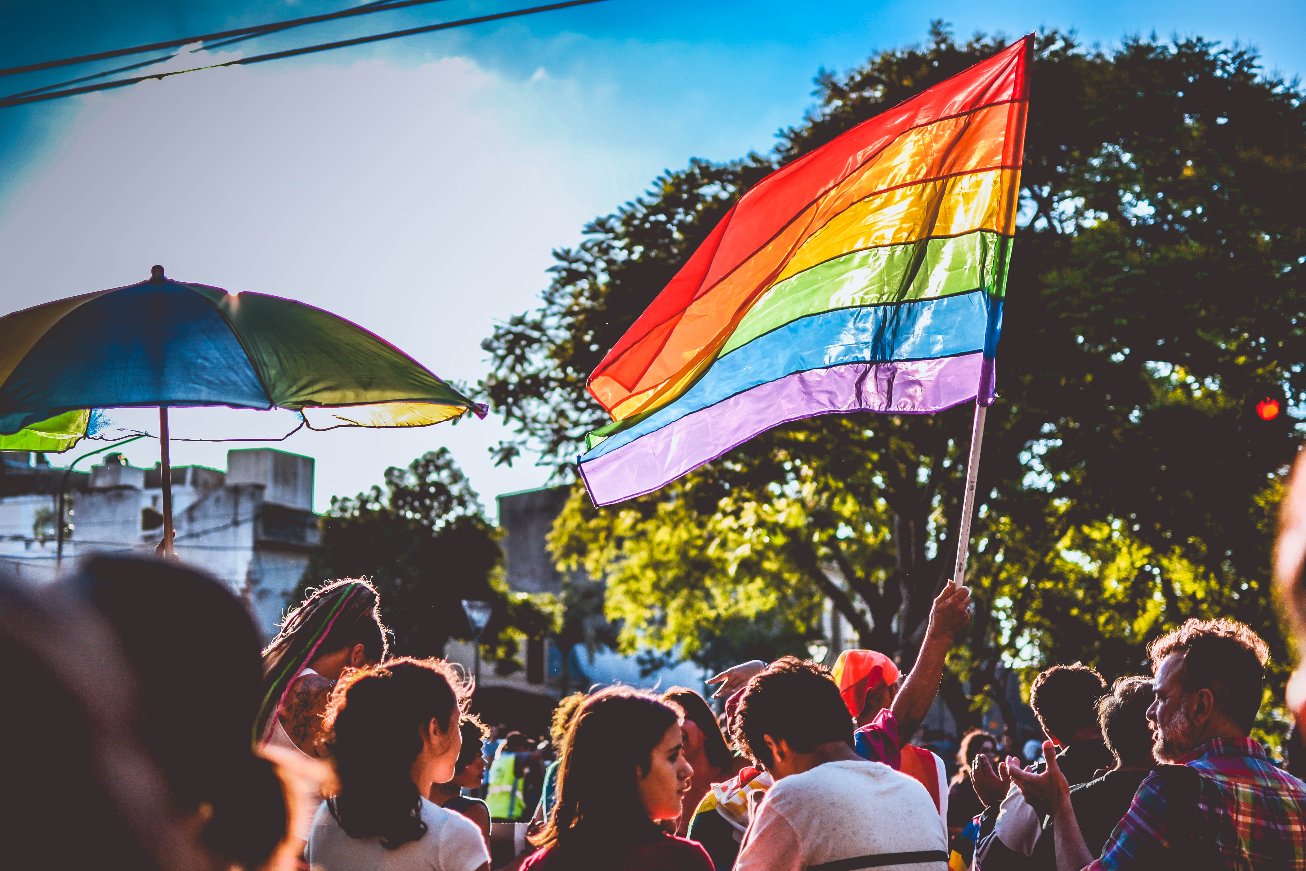 Marcha del Orgullo Santa Fe, Argentina 2017